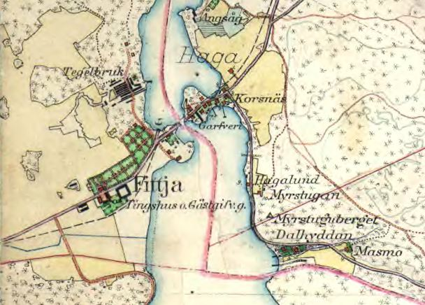 "Fittja gård" och "Fittja tegelbruk" på häradskartan